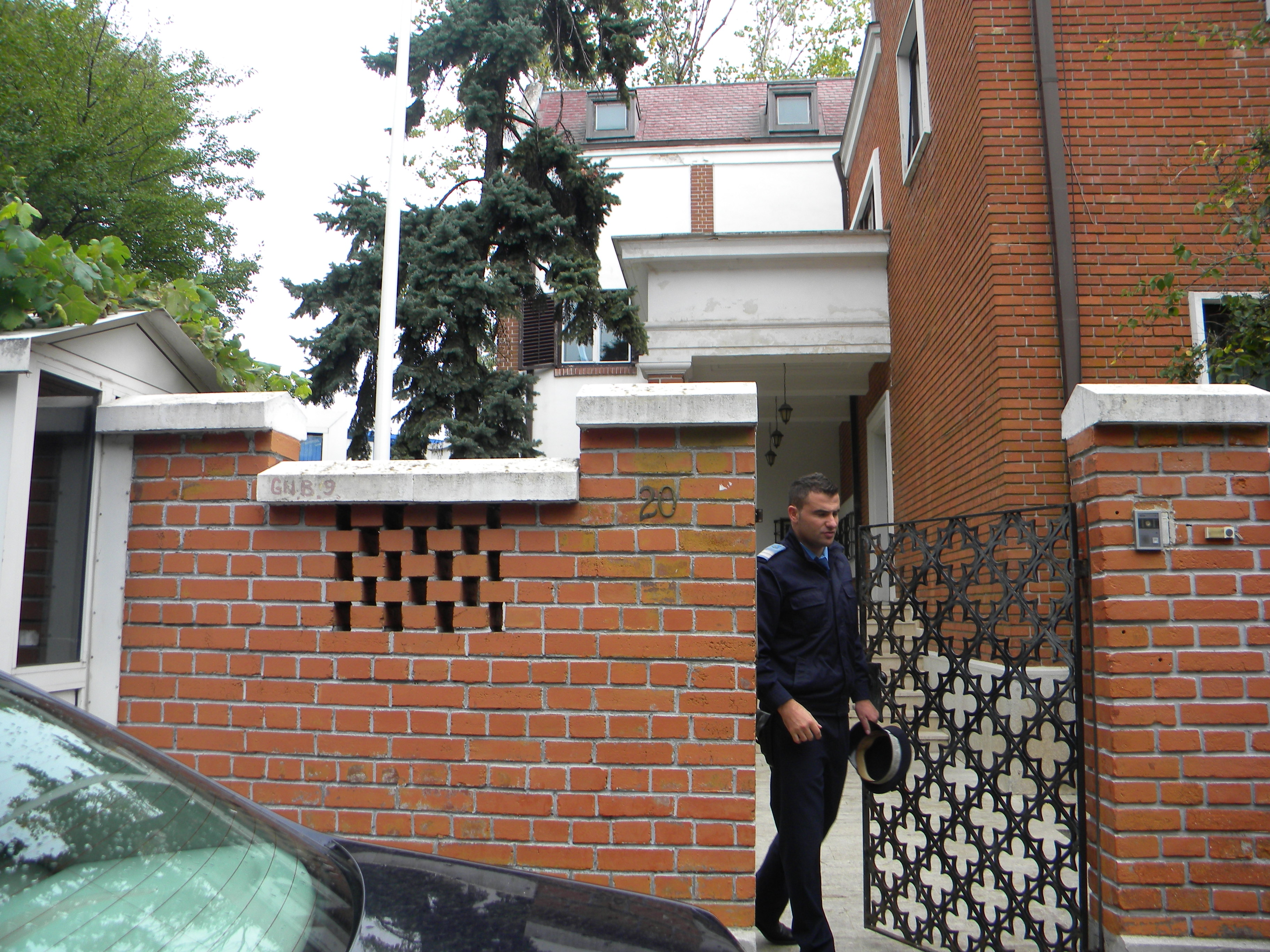 Bucuresti, Romania, Casa pe Str. Emil Pangratti nr. 20 sect. 1 (detaliu)